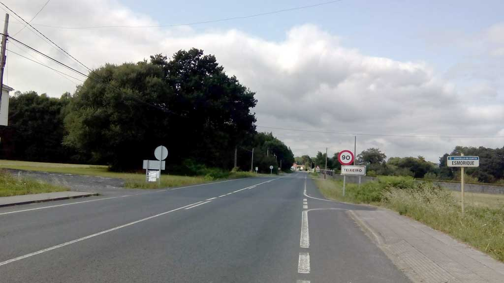 Vista do Esmorique, Curtis.